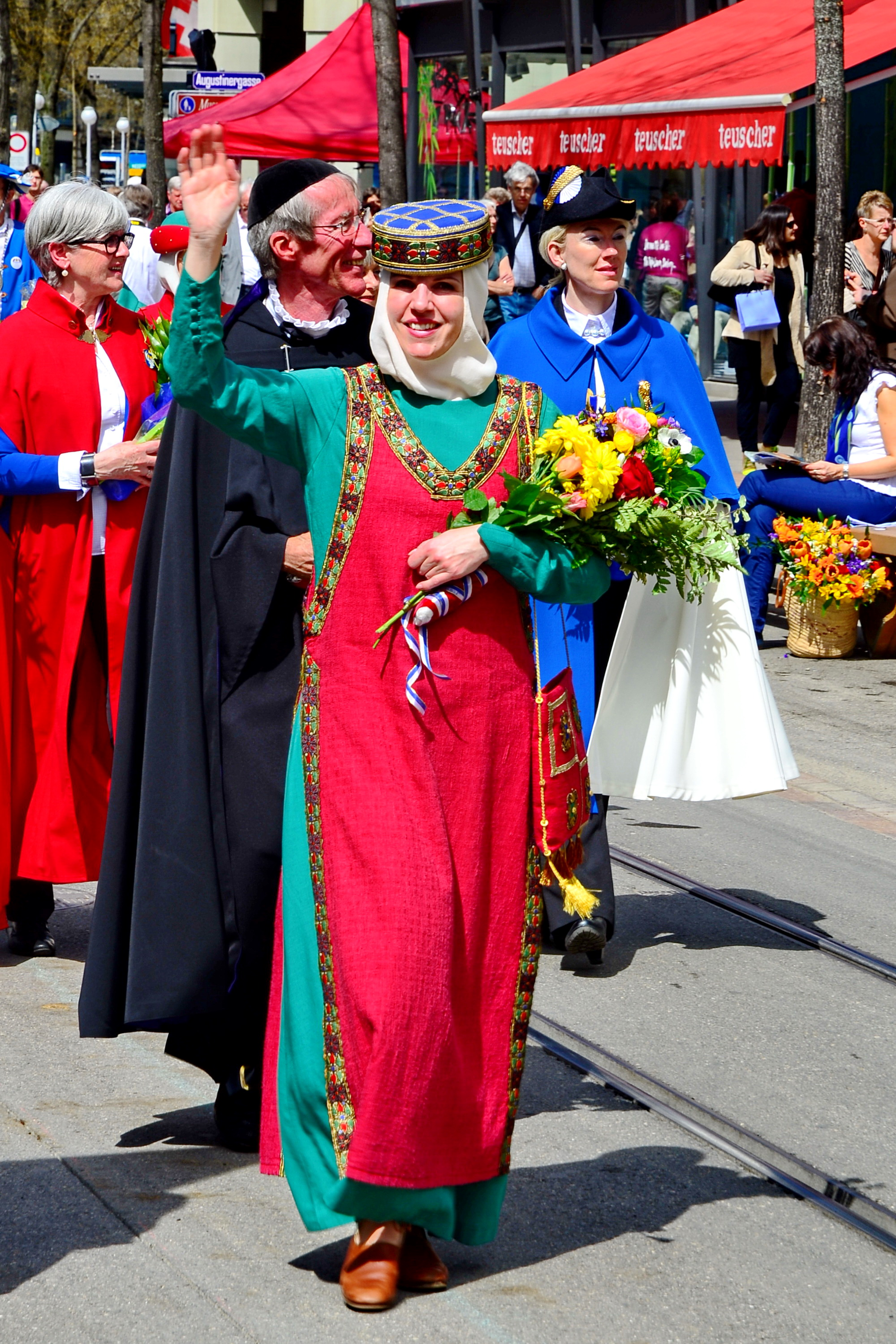 Ladies of the honorable Gesellschaft zu Fraumünster (Fraumünster society respectively guild), being (unwanted) 'guests' at the parade of the Zünfte (guilds), on Sechseläuten-Montag, April 15, 2013, in Zürich (Switzerland)